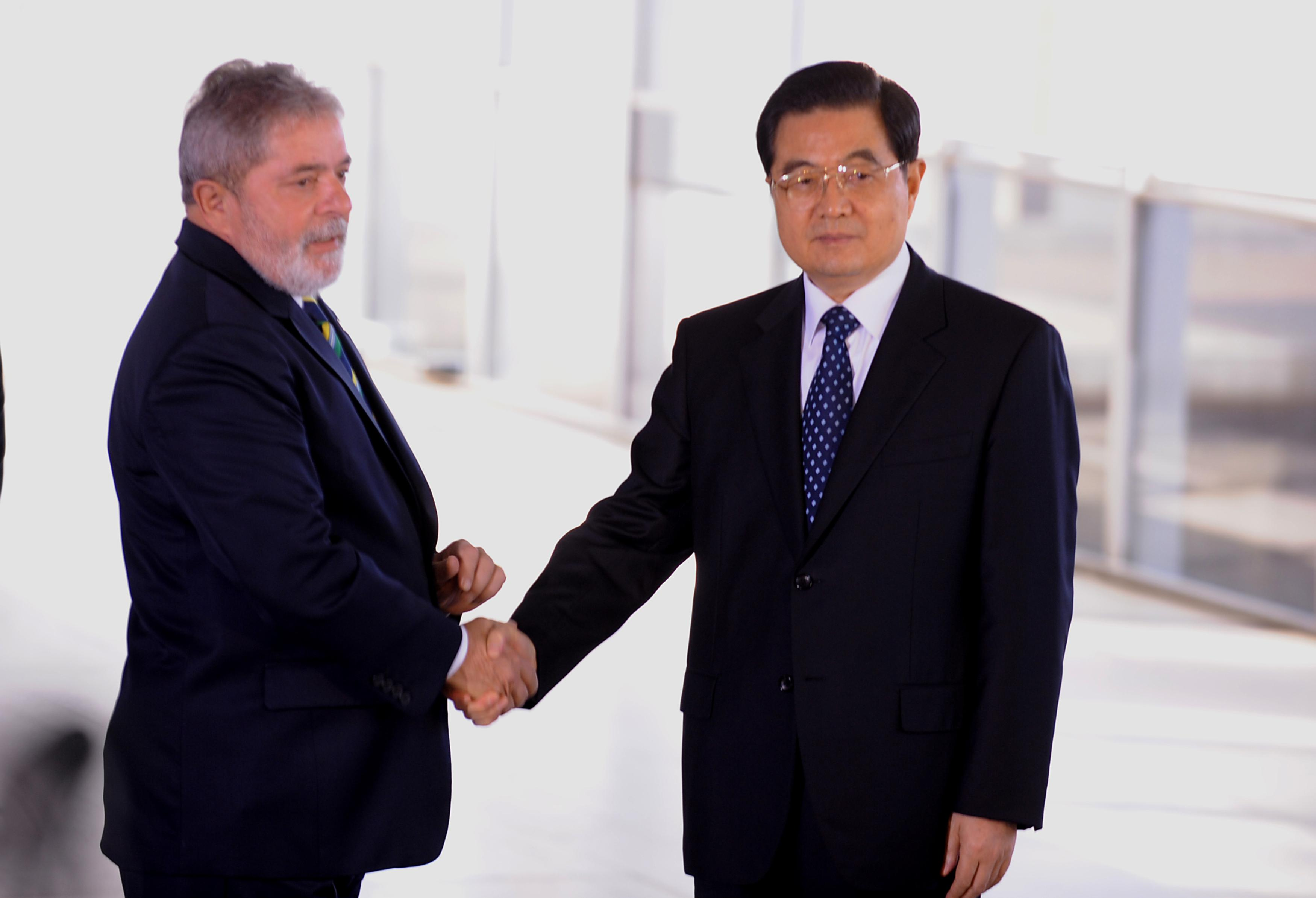 Brasília - O presidente Luiz Inácio Lula da Silva recebe o presidente da China, Hu Jintao, no Palácio Itamaraty, durante a 4.ª Cúpula de Chefes de Estado e de Governo do IBAS e 2.ª Cúpula de Chefes de Estado e de Governo do BRIC (Roosewelt Pinheiro/ABr)